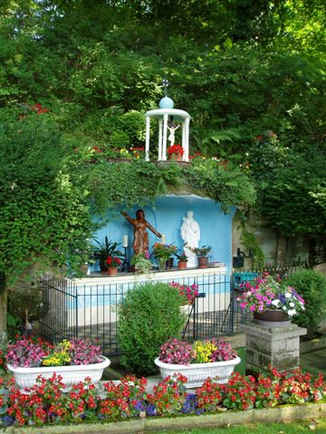 Grotte de Notre Dame de Lourdes à Lengelsheim.